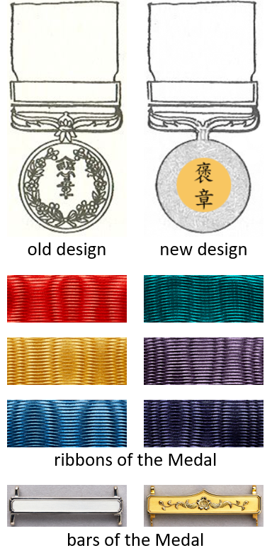 Верх старый и новый дизайн Медалей Почёта (Япония) Низ Орденские ленты различных категорий награды "орденские планки" и золотая и серебряная планки кратного награждения не показаны.Unknown